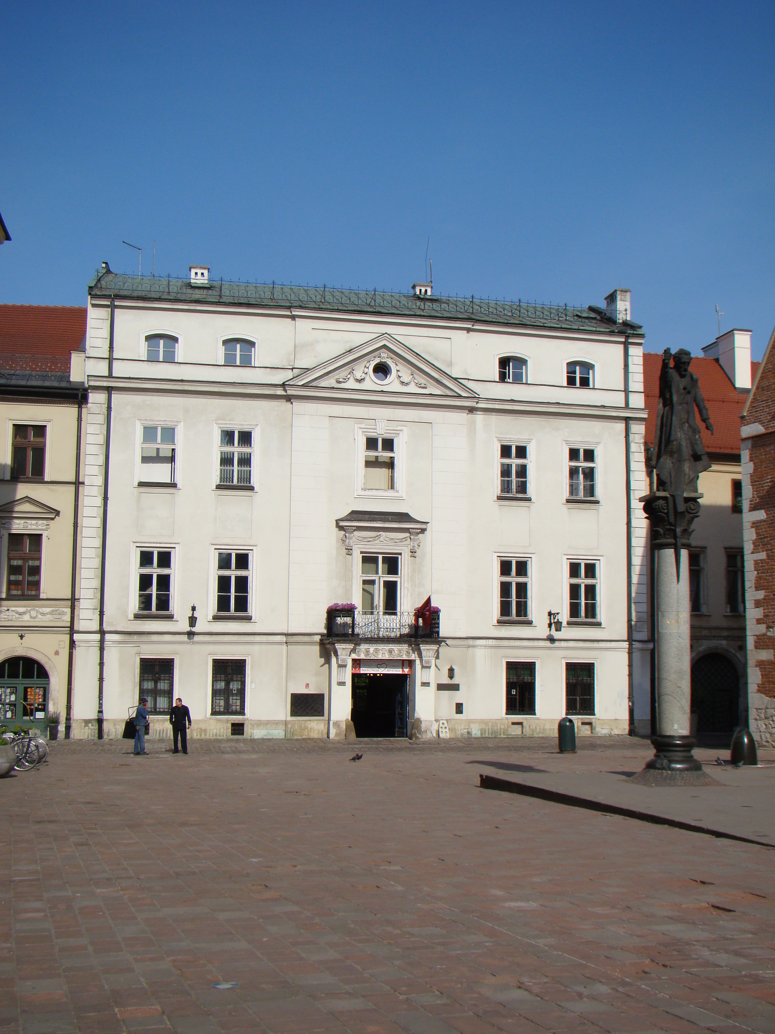 Kraków, dom, poł. XIV, 1787, XIX